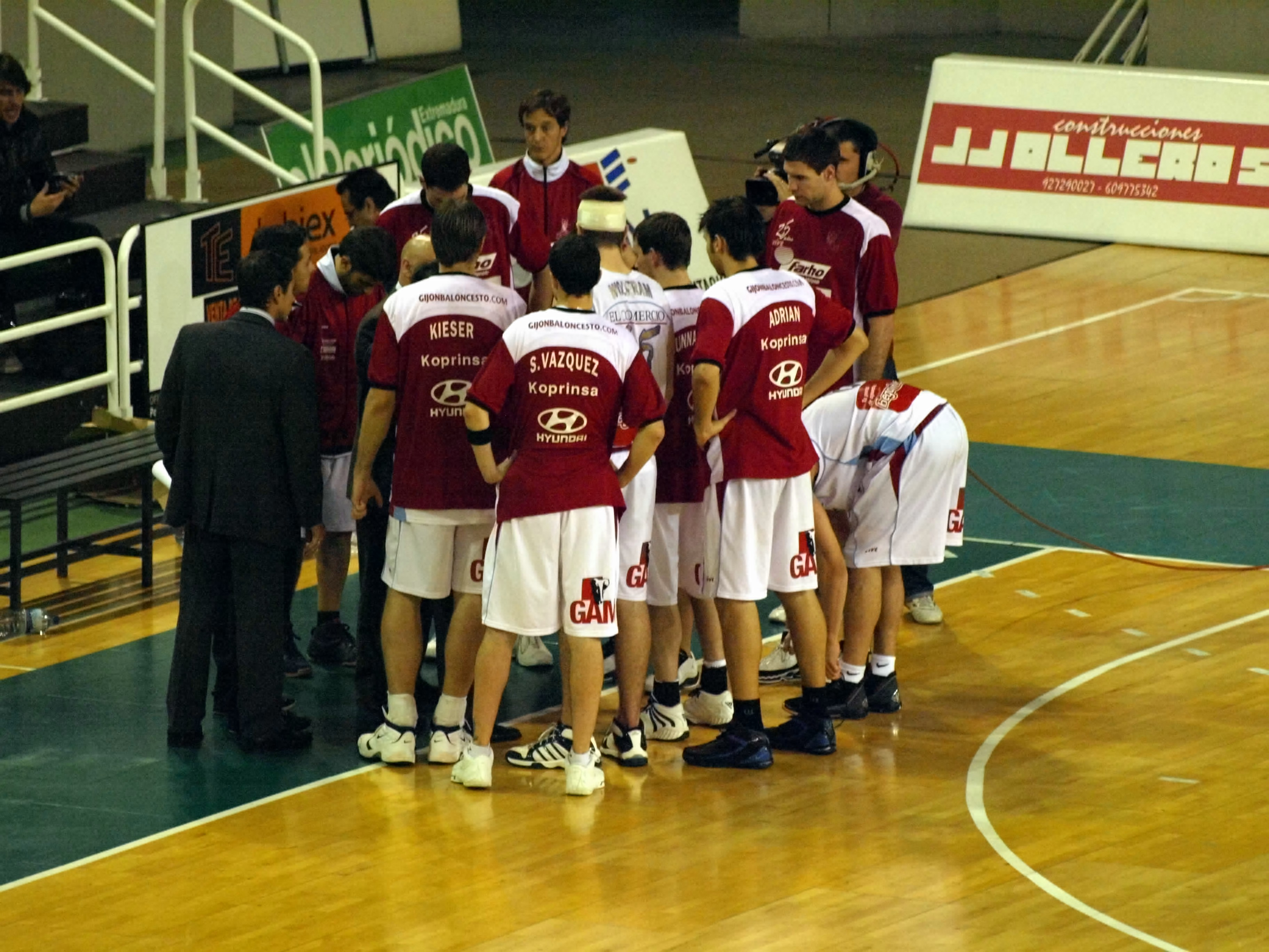 Farho Gijón durante un partido ante el Cáceres 2016